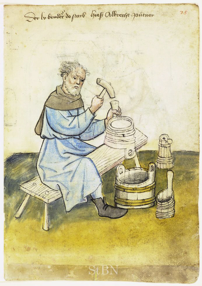 Albrecht (Albrecht) Pütner (Pütner; Büttner) , Pütner (Büttner) Transkription und weitere Informationen